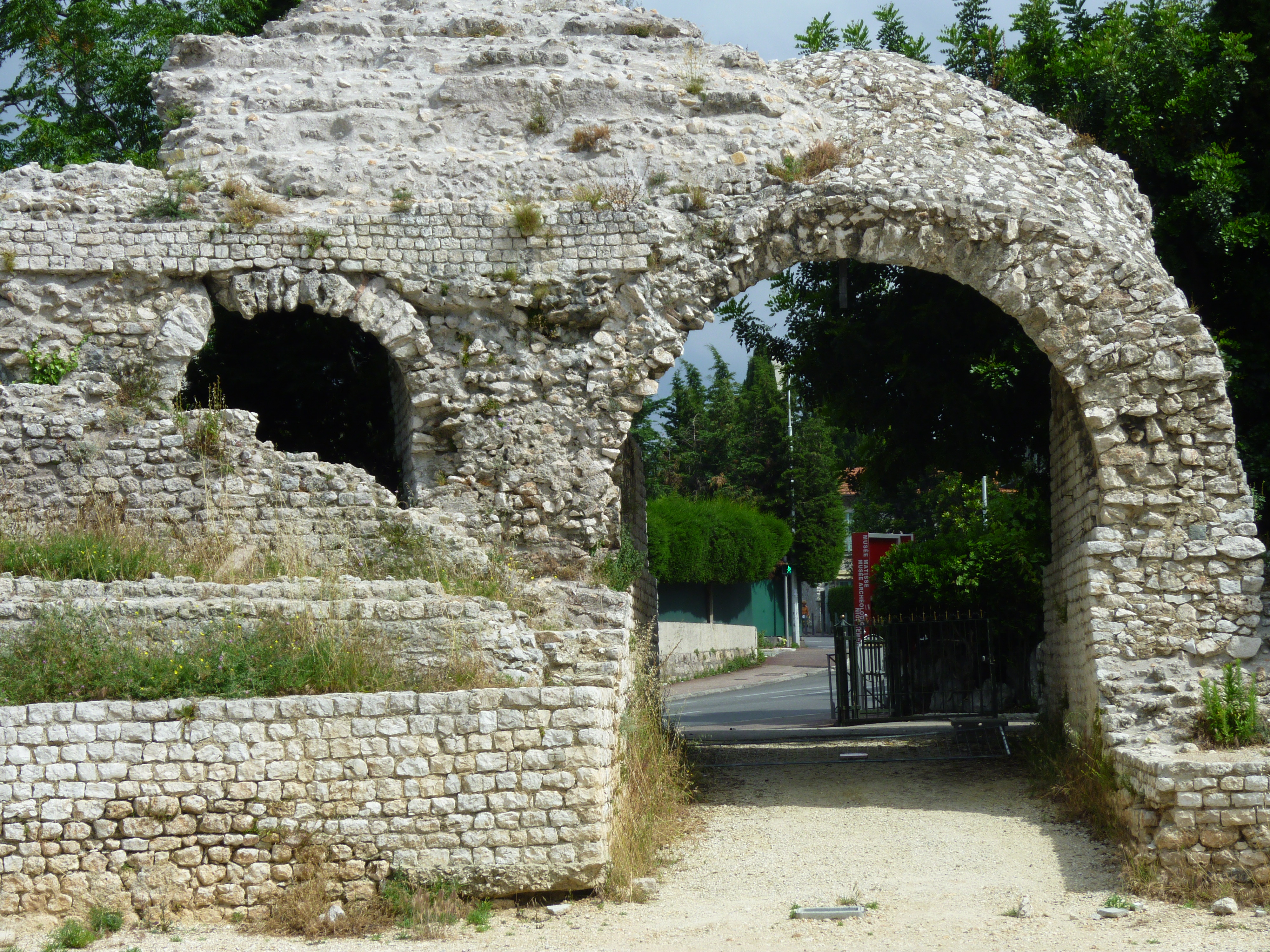 Arènes romaines de Cimiez, (Nice, Alpes-Maritimes, France). .